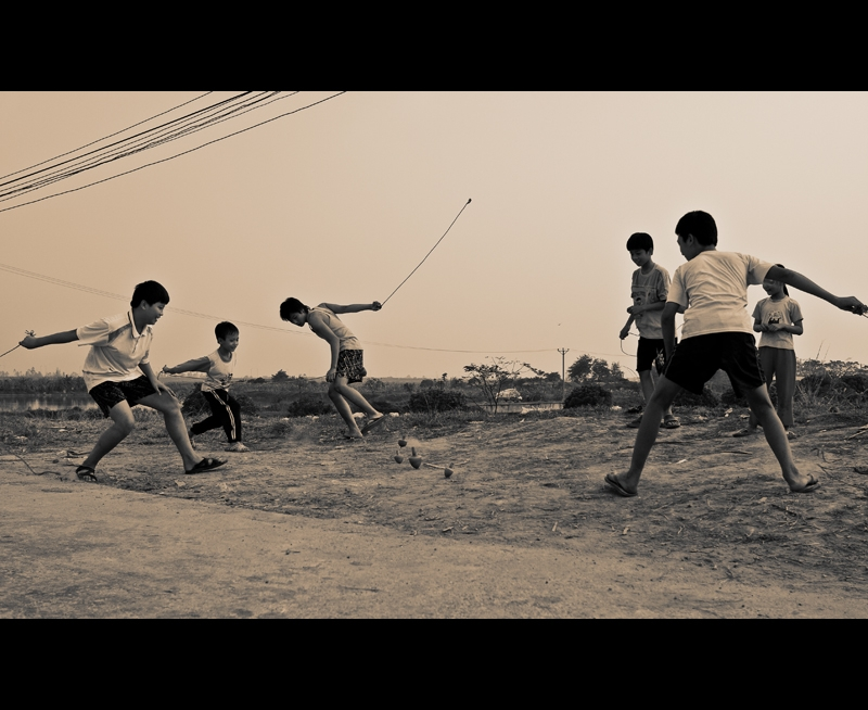 Old Vietnamese game